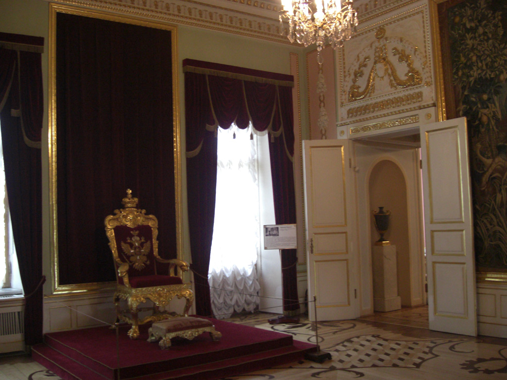 Тронная Павла I в Большом Гатчинском дворце